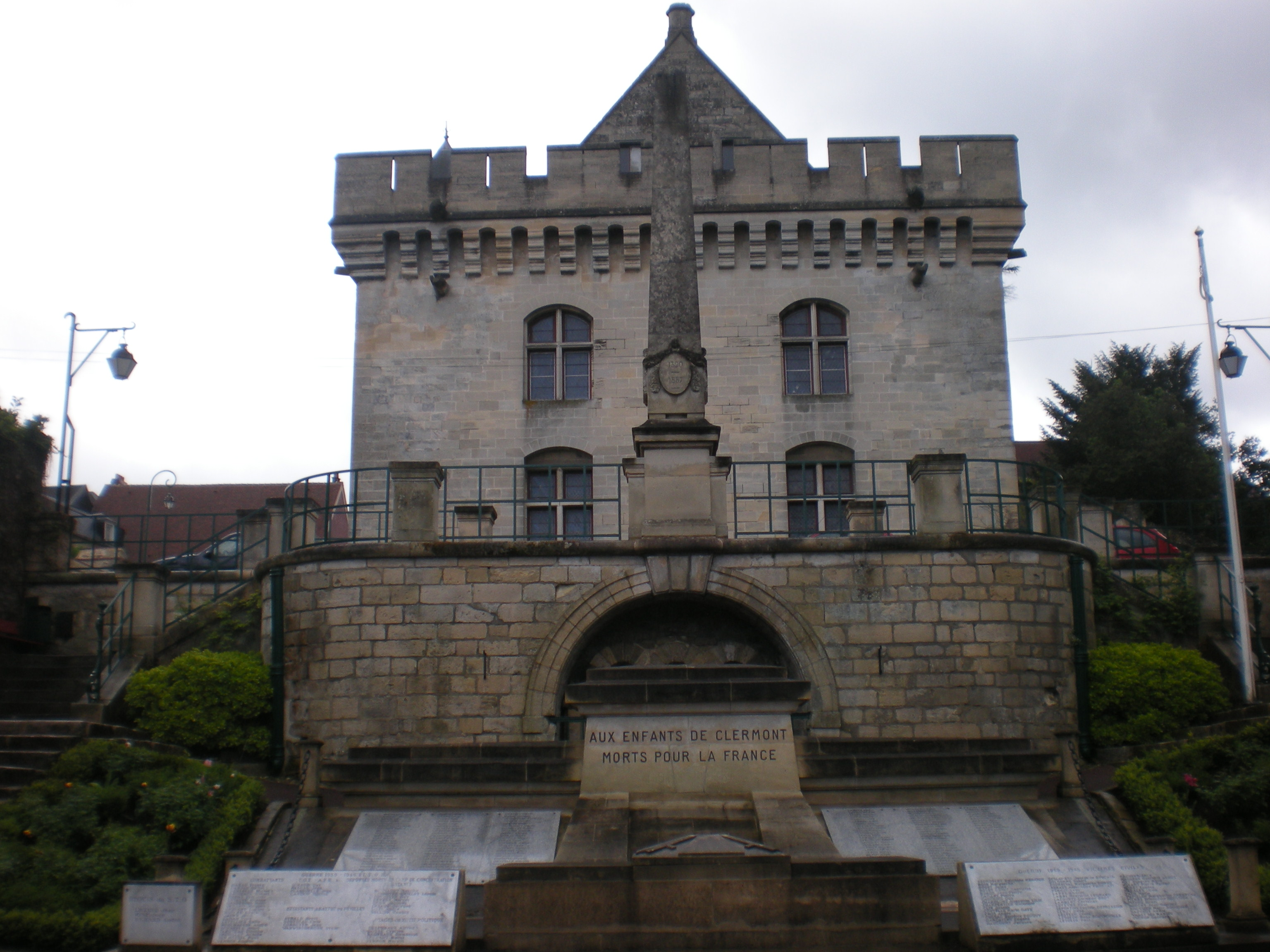 Le monumument aux morts